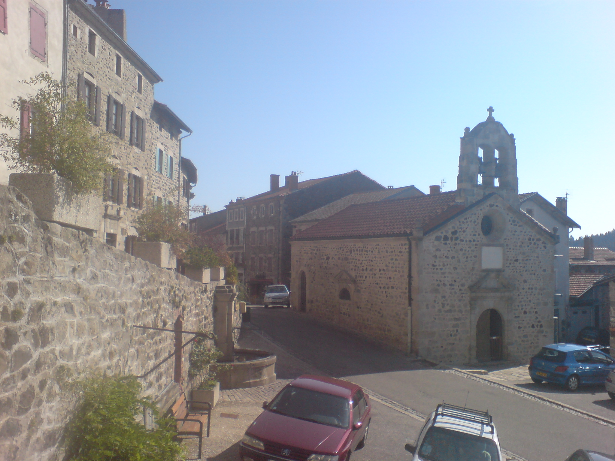 Chapelle située en contrebas de la vieille ville